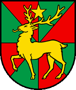 Wappen von Syens Kanton Waadt